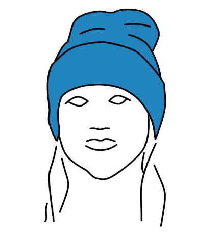 A beanie hat.